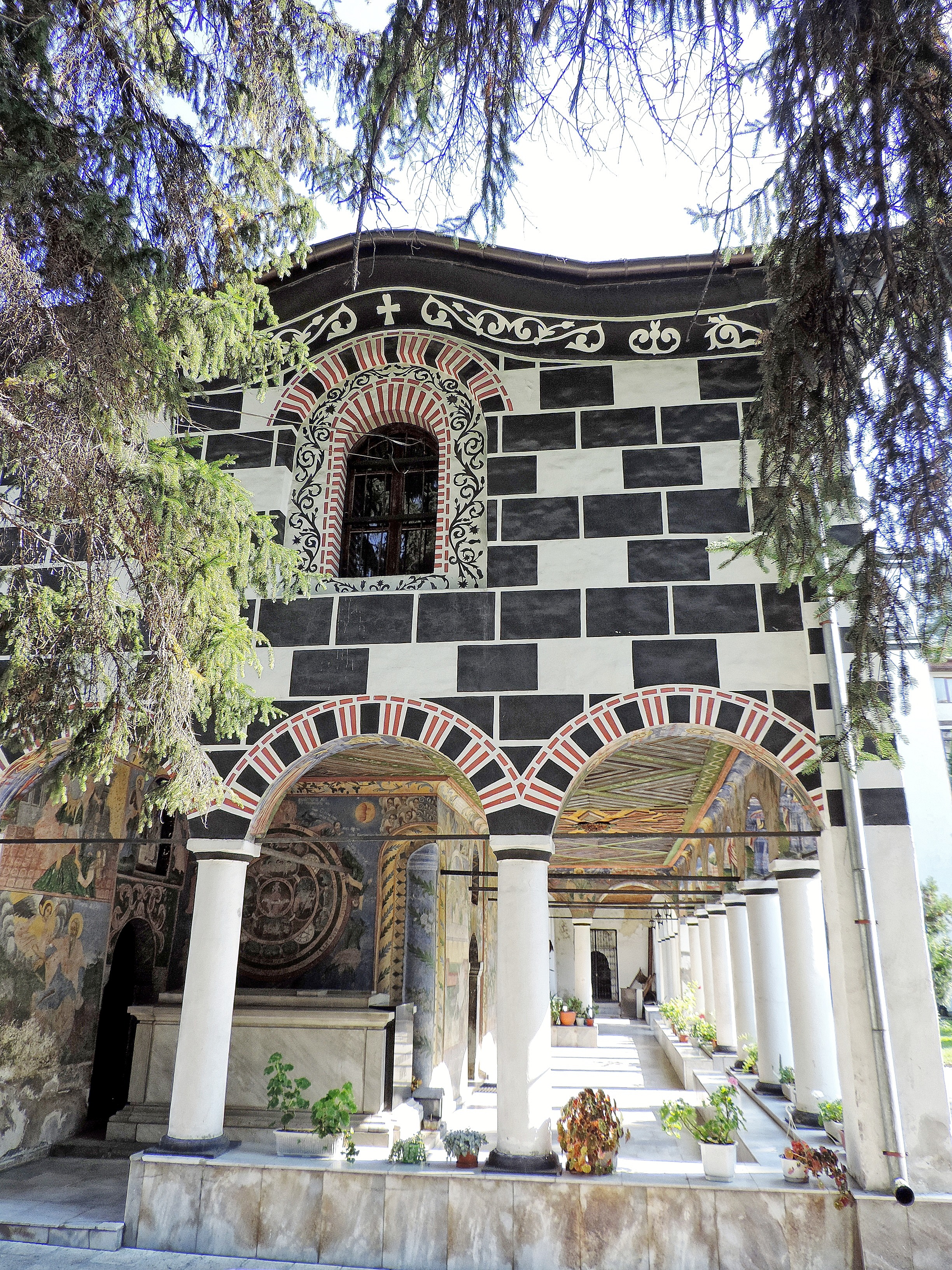 Църквата „Въведение Богородично“ в Благоевград с гранитния сарофаг на митрополит Борис Неврокопски